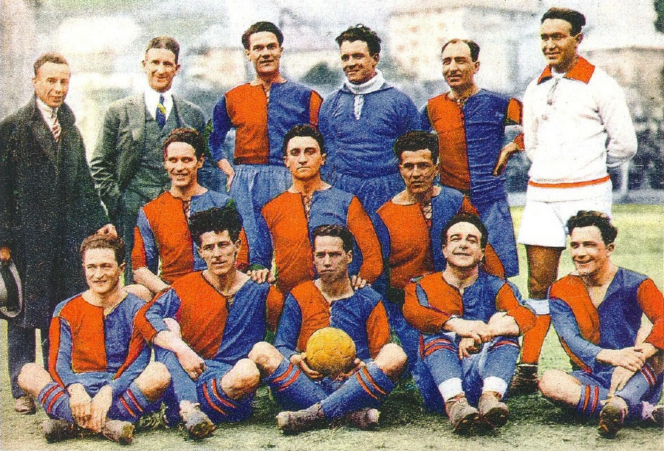 Genova, Campo di Via del Piano, 2 marzo 1924. La formazione del Genoa CFC scesa in campo nella sconfitta interna contro l'AC Padova (1-2) valevole per la 18ª giornata del campionato italiano di Prima Divisione 1923-24, Lega Nord, girone A. Da sinistra, in alto: Castello (dirigente), W. Garbutt (allenatore), D. Bellini, G. De Prà, R. De Vecchi, Alfieri (arbitro); al centro: O. Barbieri, L. Burlando, E. Leale; in basso: E. Neri, E. Sardi (II), E. Catto (I), A. Santamaria (I), A. Bergamino (I).